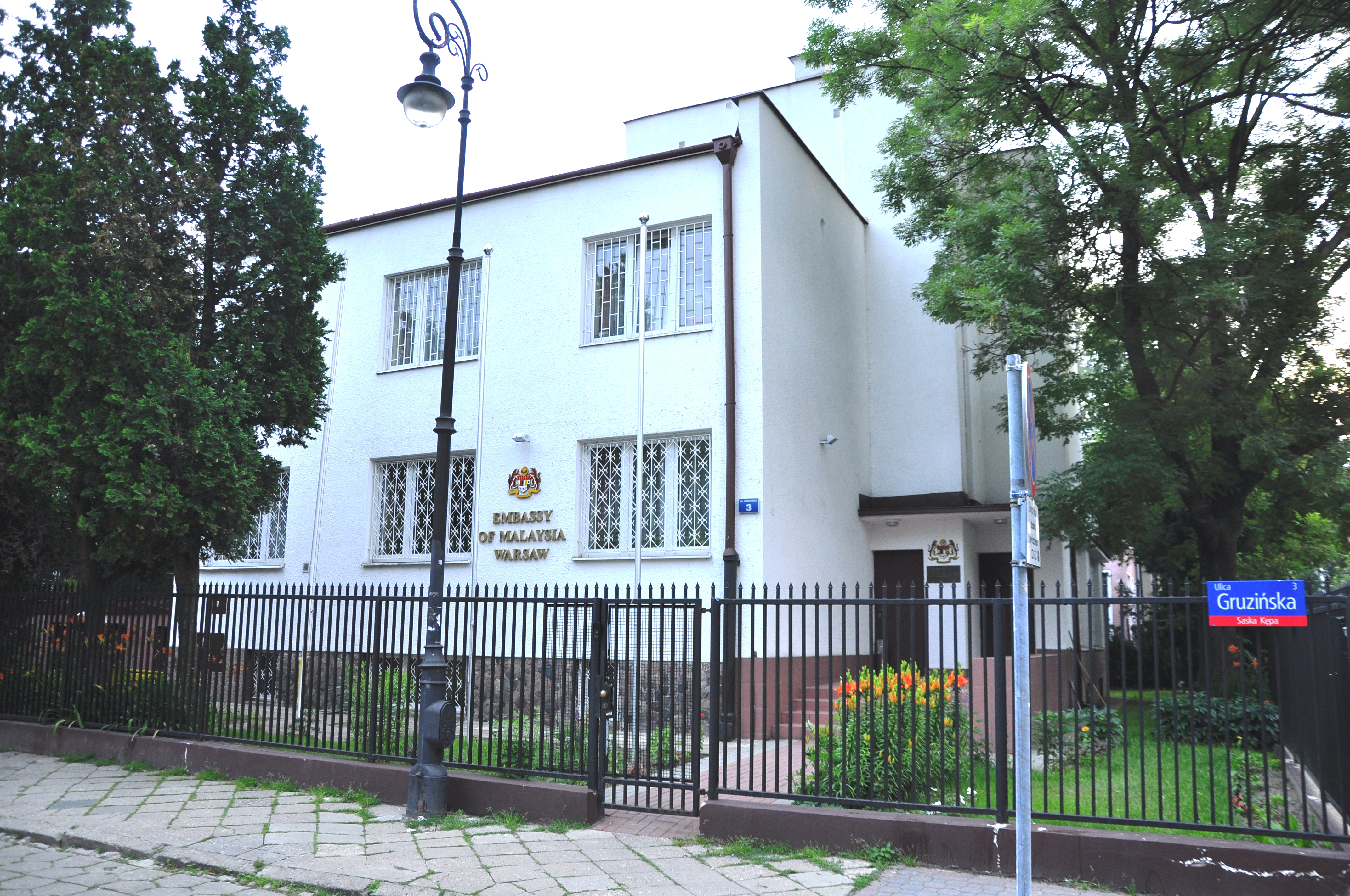 Saska Kępa Botschaft